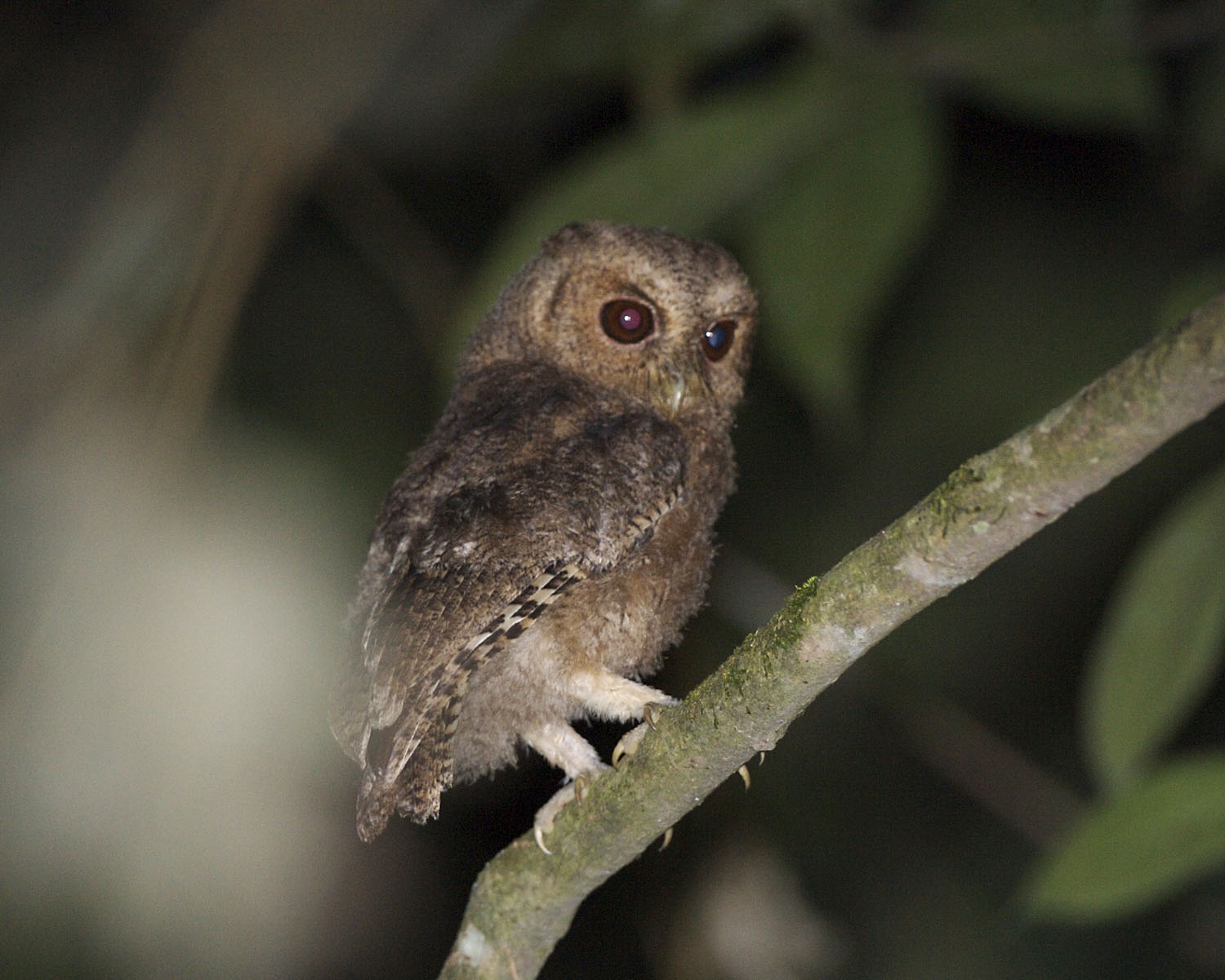 Rajah Scops Owl Otus brookii Location: Altitude 1830m, Gunung Gede, Java, Indonesia. 26 August 2006.